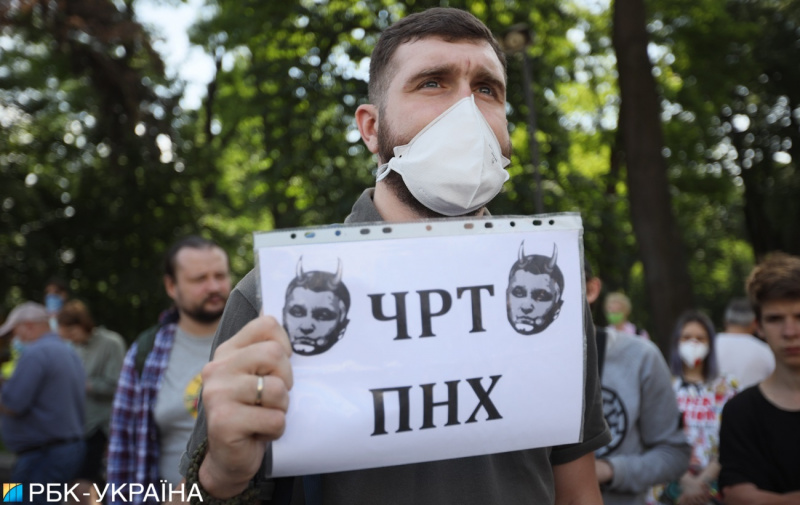 Акція протесту проти Авакова під Верховною радою, Київ, 18.06.2020